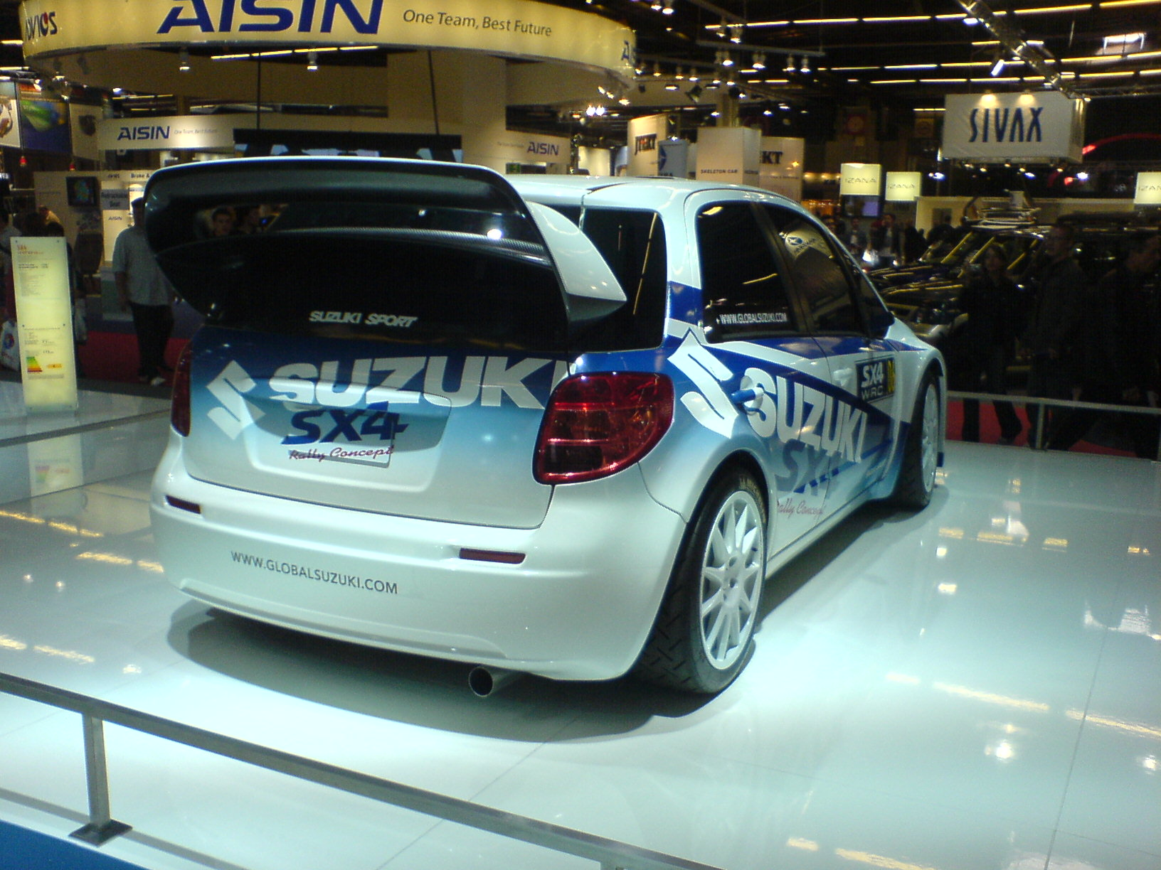 Photo de la Suzuki SX4 prise par GôTô au mondial de l'automobile de Paris 2006